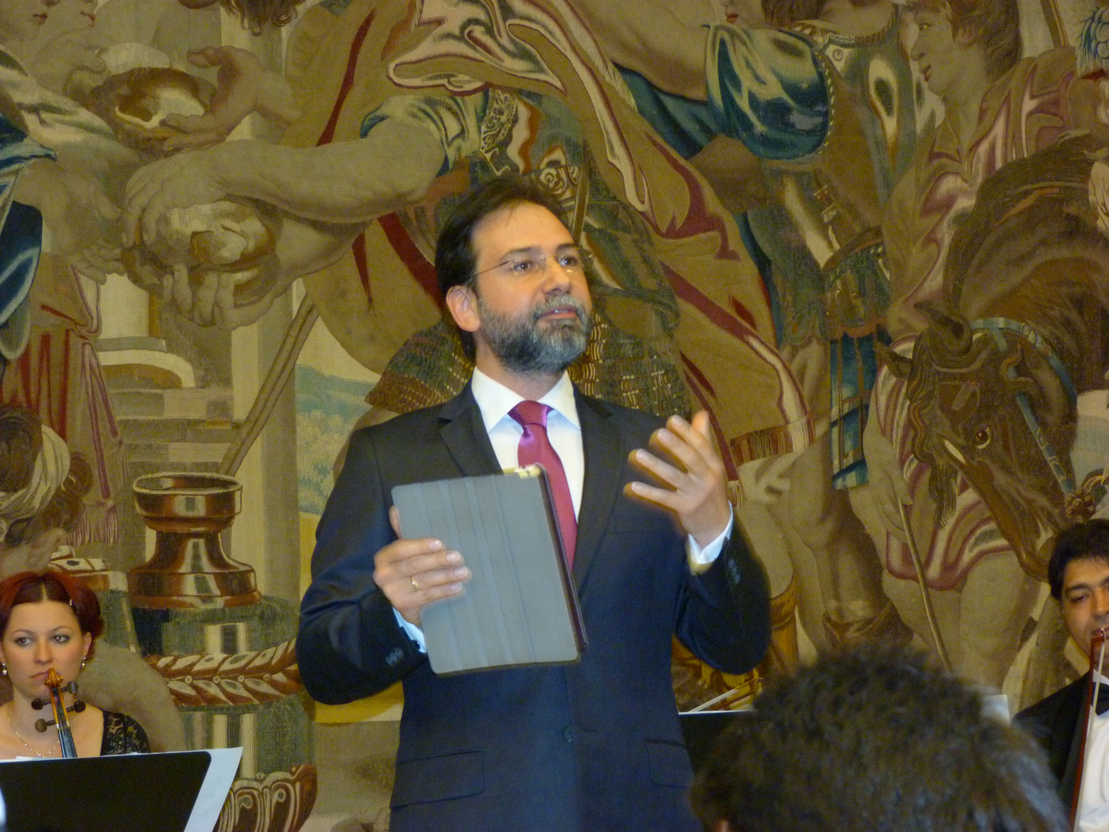 A felvételek 2014. április 23 –án szerdán készültek Budapesten, az Országos Széchenyi Könyvtárban. A Török Köztársaság Magyarországi Nagykövete, Szőcs Géza miniszterelnöki főtanácsadó, Fodor Pál Magyar Tudományos Akadémia Bölcsészettudományi Kutatóközpontja, a Yunus Emre Enstitüte elnökhelyettese, a Yunus Emre Enstitüte igazgatója, Káldos János az Országos Szécheniy Könyvtár megbízott főigazgatója.